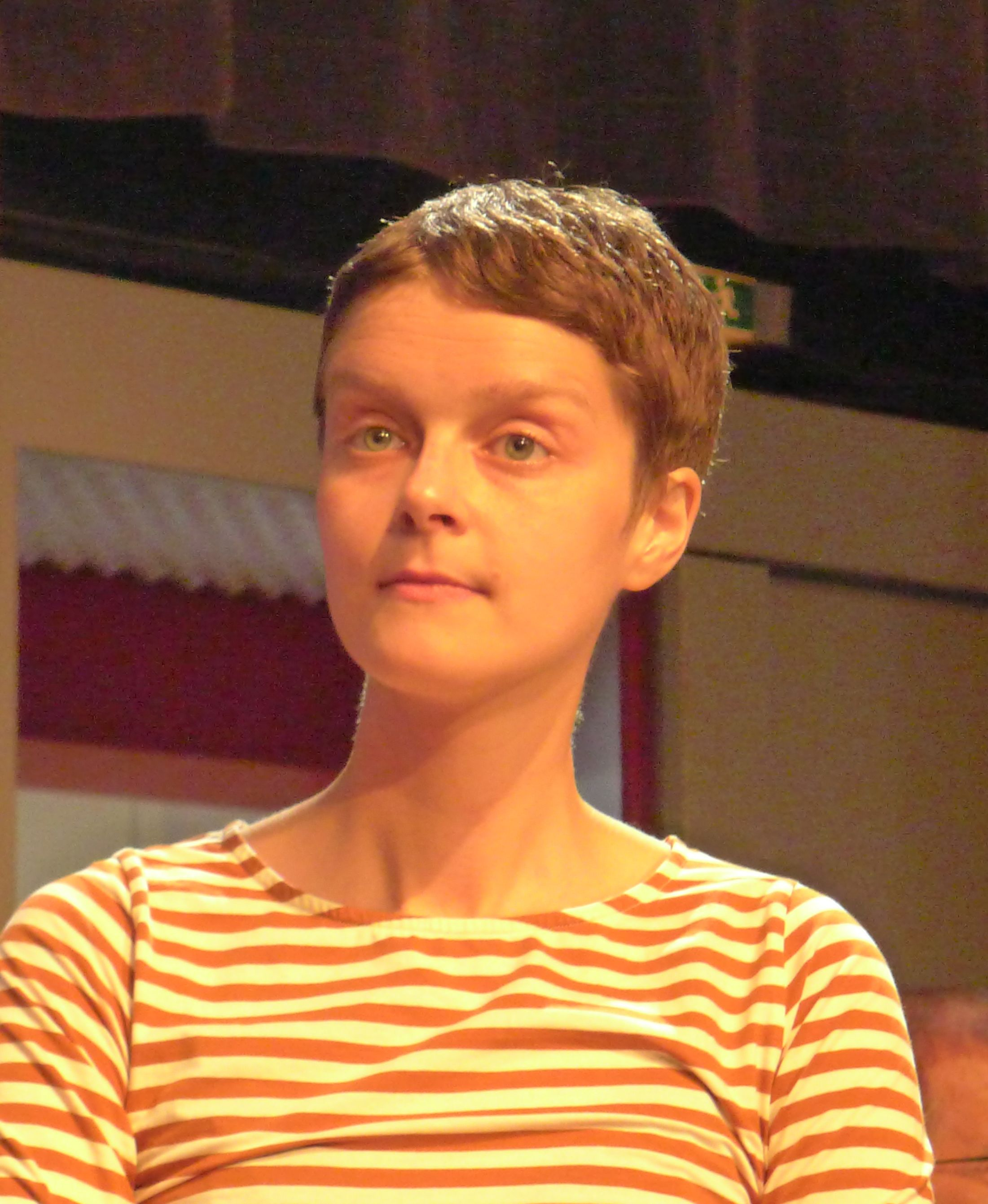 deutsche SchriftstellerinUnknown german writer